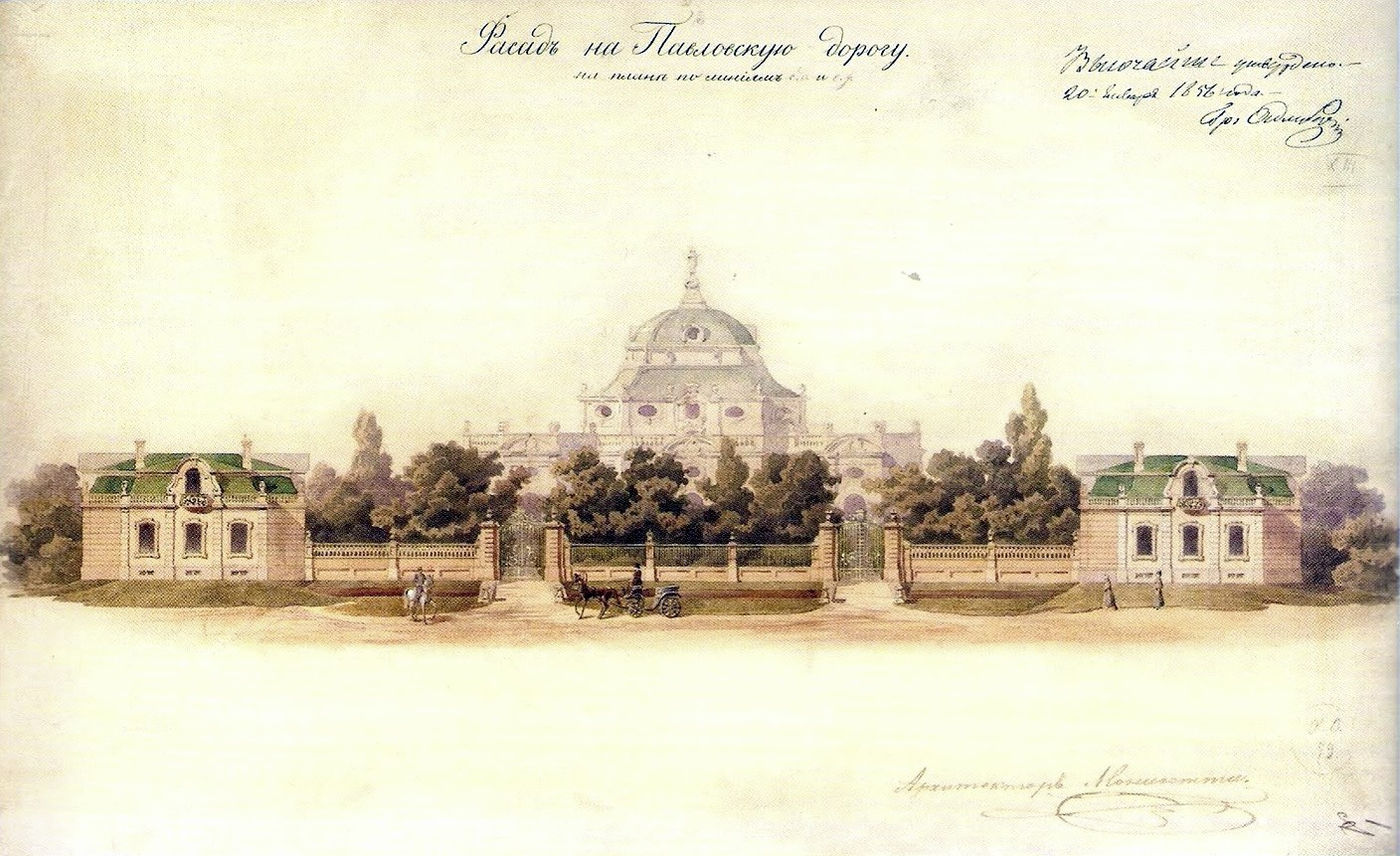 Проект царскосельской дачи Зинаиды Юсуповой